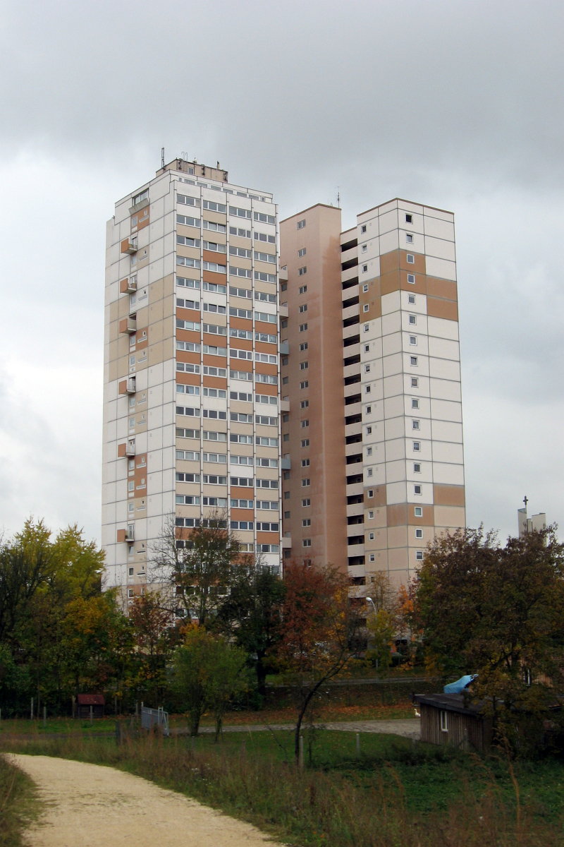 Stuttgart-Fasanenhof, Hochhaus Fasanenhofstraße 6